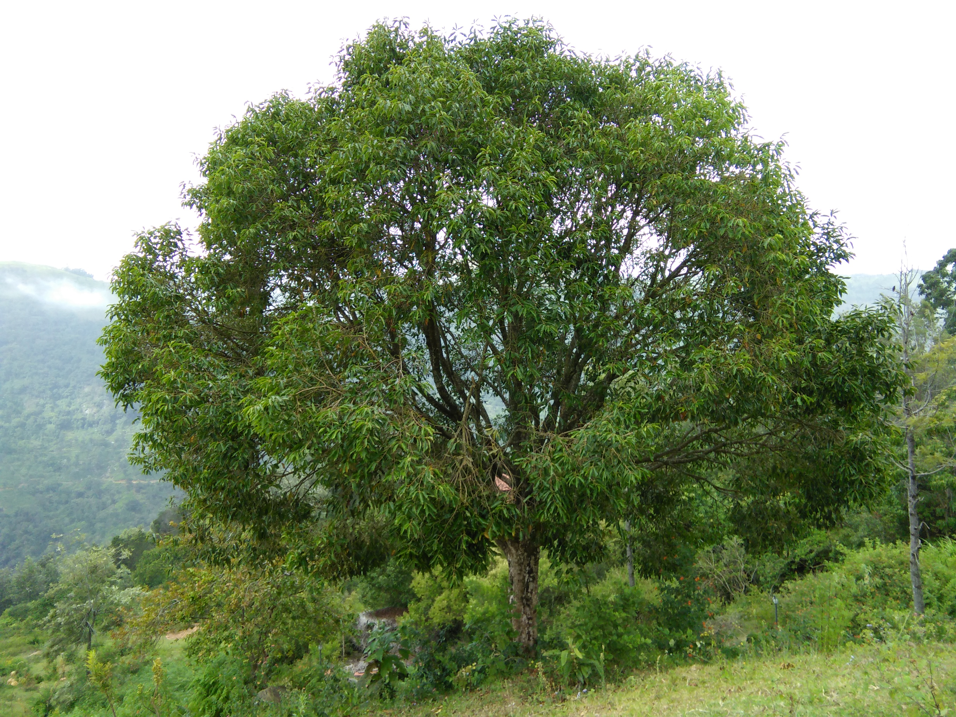 Fruiting Syzygium cumini at Coonoor, Nilgiris, Tamil Nadu, India